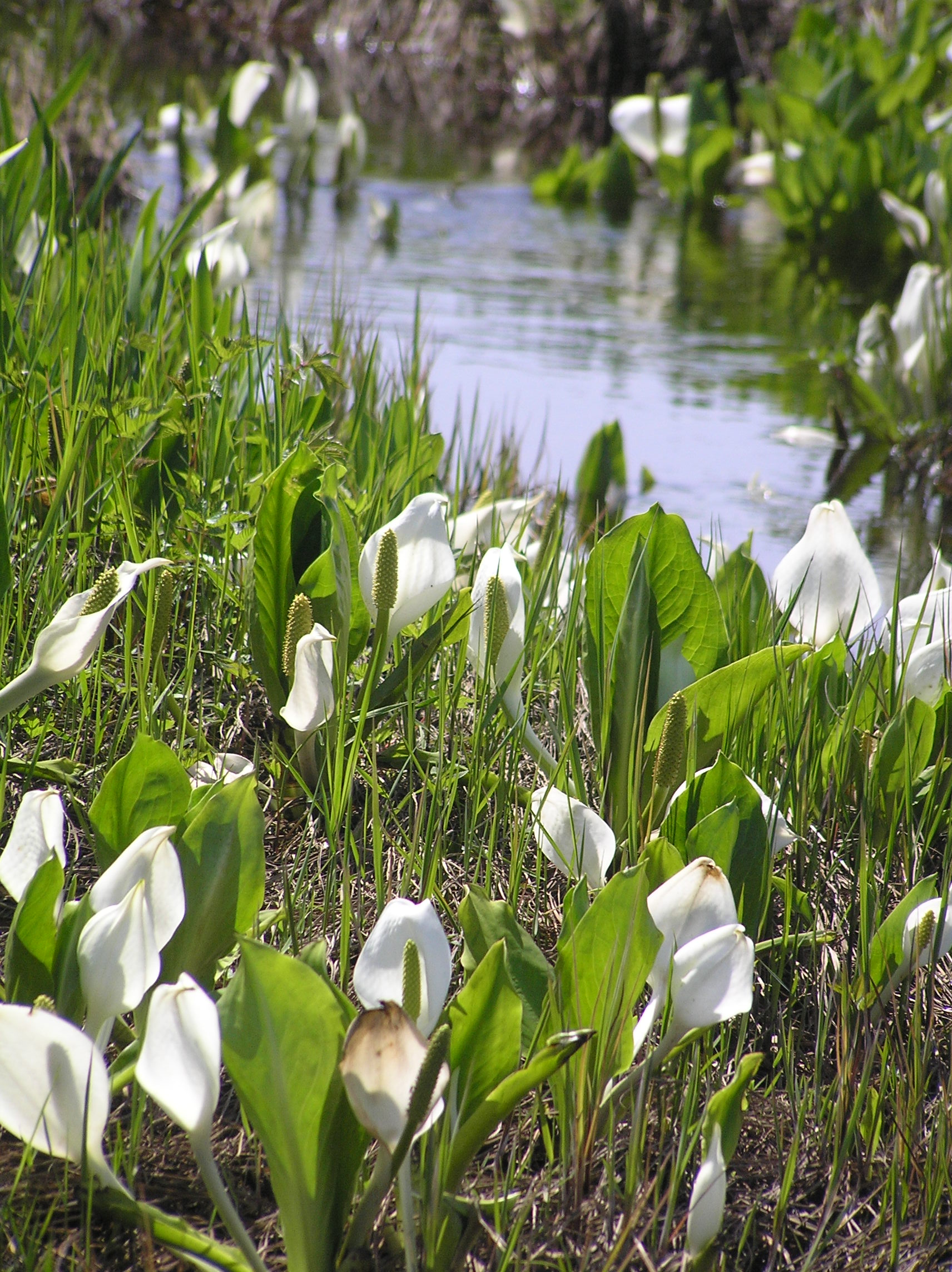 北海道雨竜沼